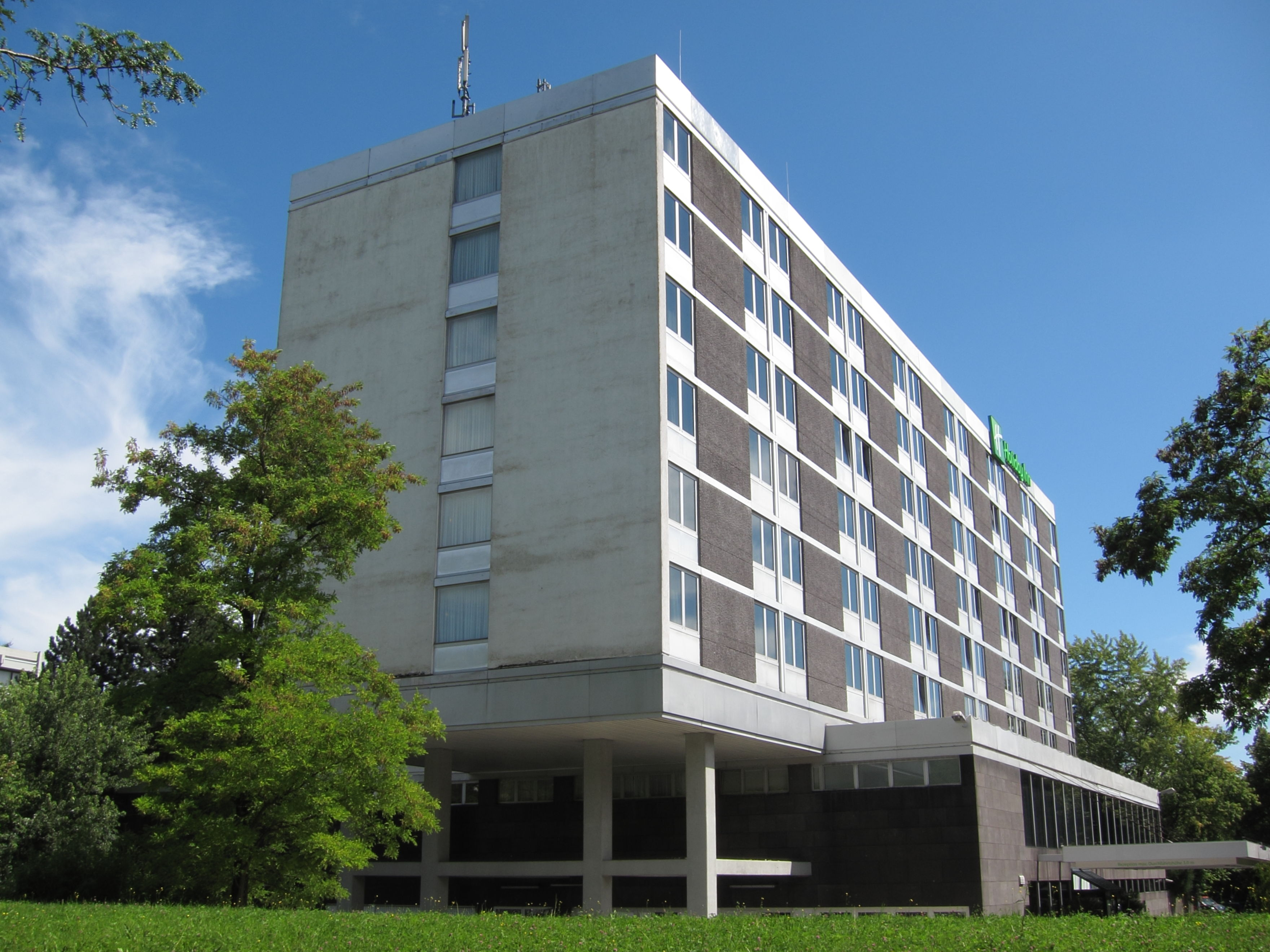 Holiday Inn in München, Effnerstraße 99; ehemals Esso-Motor-Hotel, gebaut 1969 - 1970 nach Entwurf von Sep Ruf.